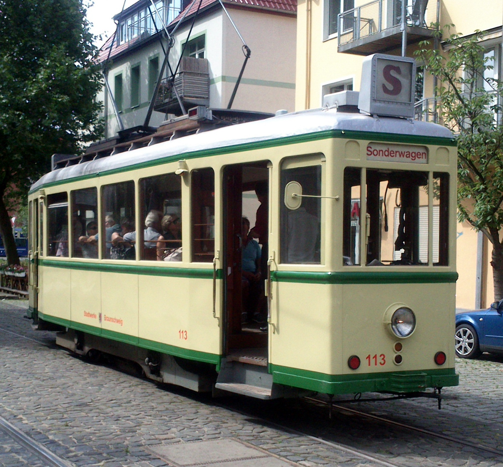 Braunschweig, Straßenbahn Braunschweig: Triebwagen Nr. 113, Bauart 2x ZR, der Firma Waggonfabrik Gebrüder Credé aus dem Jahre 1940, in originaler beige-grüner Lackierung.